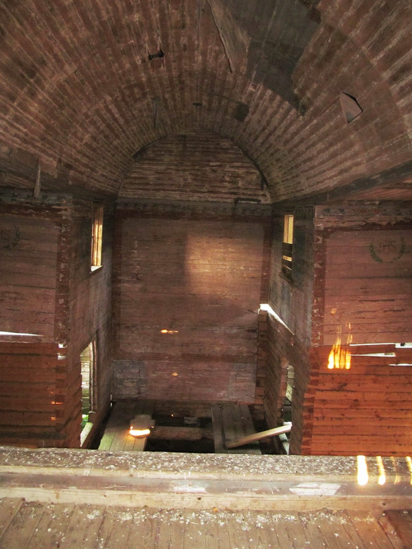 Рамні. Касцёла Святых Пятра і Паўла